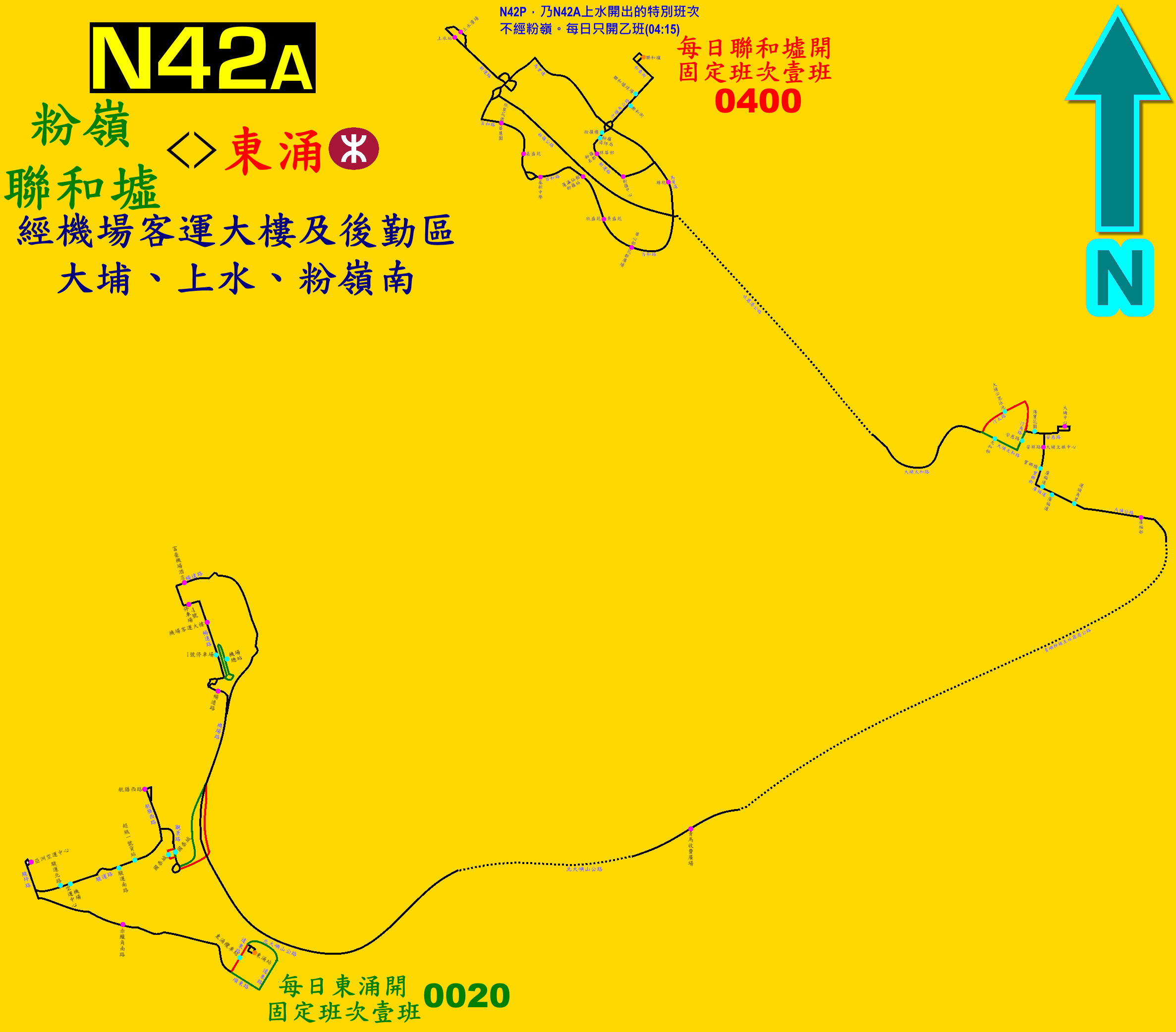 中文（香港）: 龍運巴士N42A線的走線圖